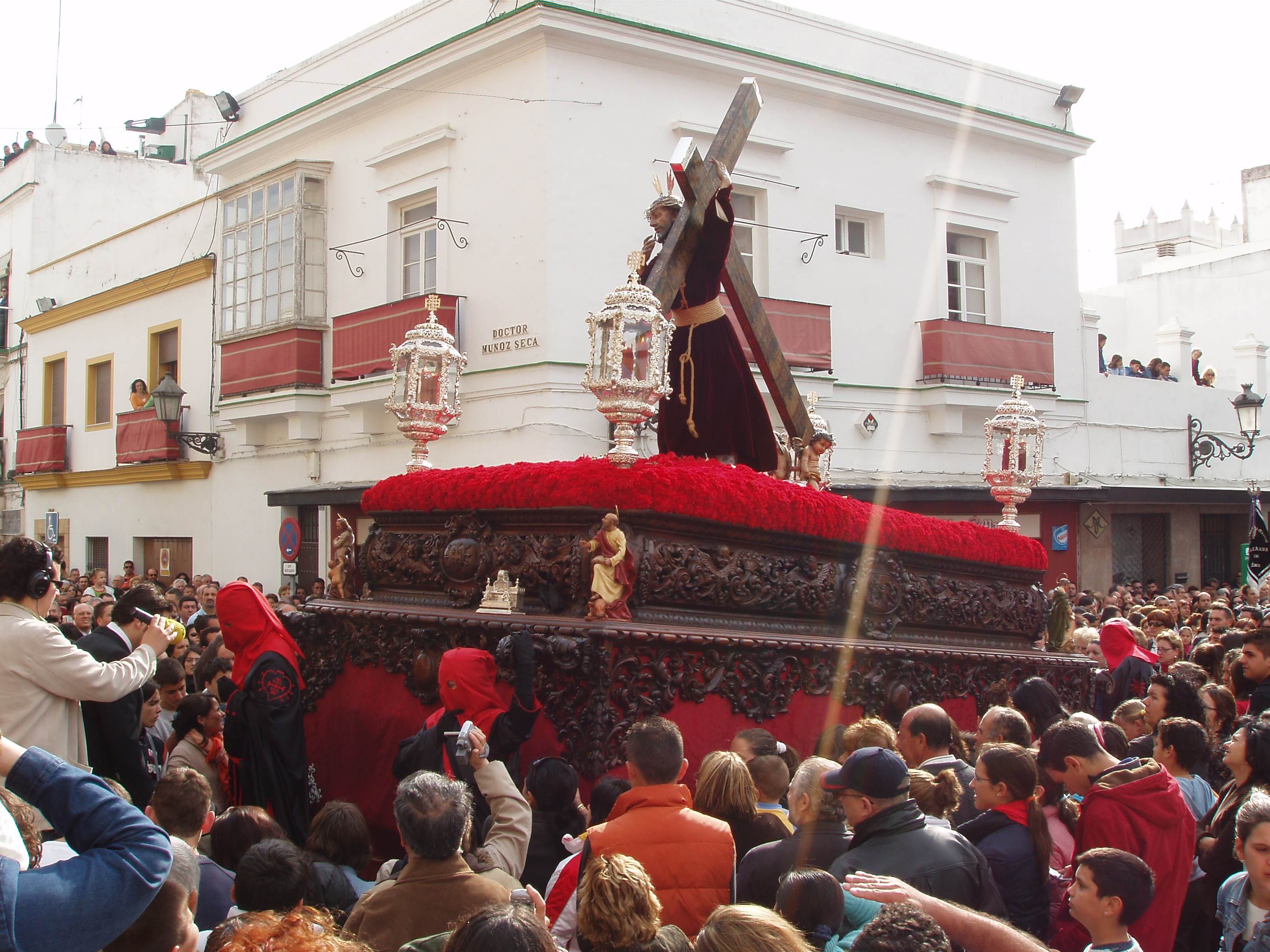 El Nazareno regresando a su templo, El Puerto. Viernes Santo. Semana Santa en El Puerto de Santa María. Año 2006.